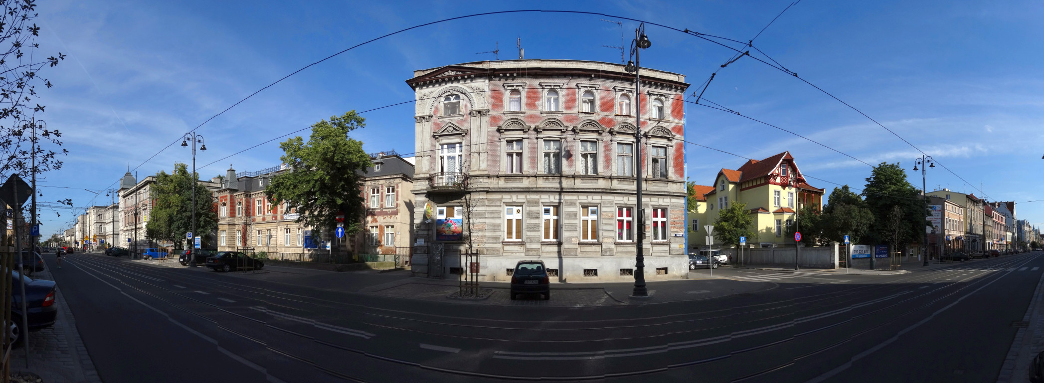 Ulica Gdańska w Bydgoszczy